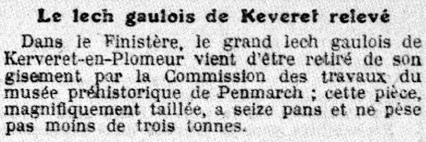 Article du journal La Croix indiquant le déplacement du lech de Kerveret (Kervered) en Plomeur vers le Musée de la Préhistoire de Penmarch en 1924.